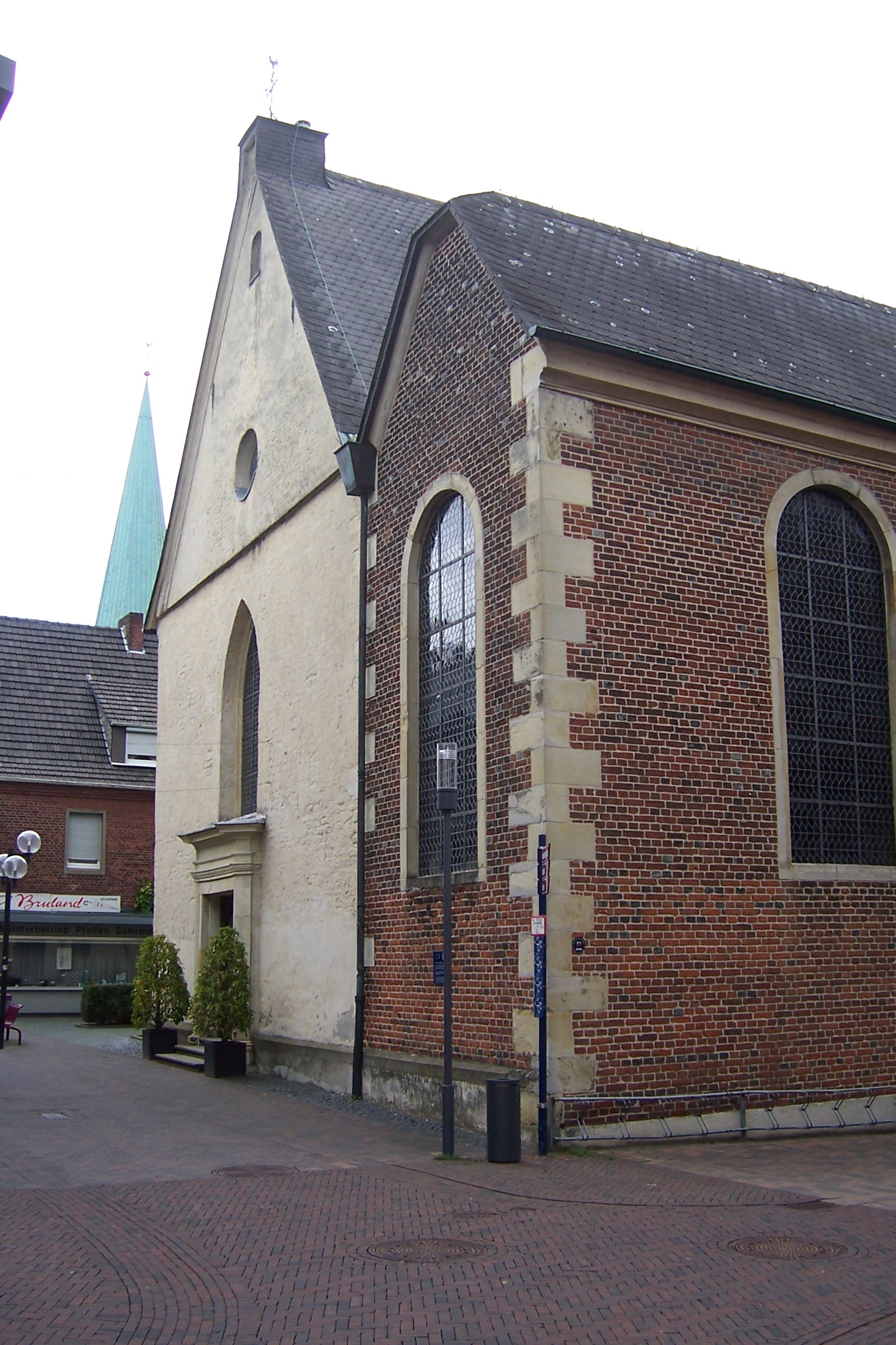 Westansicht St. Johannes, Borken, NRW, Germany.